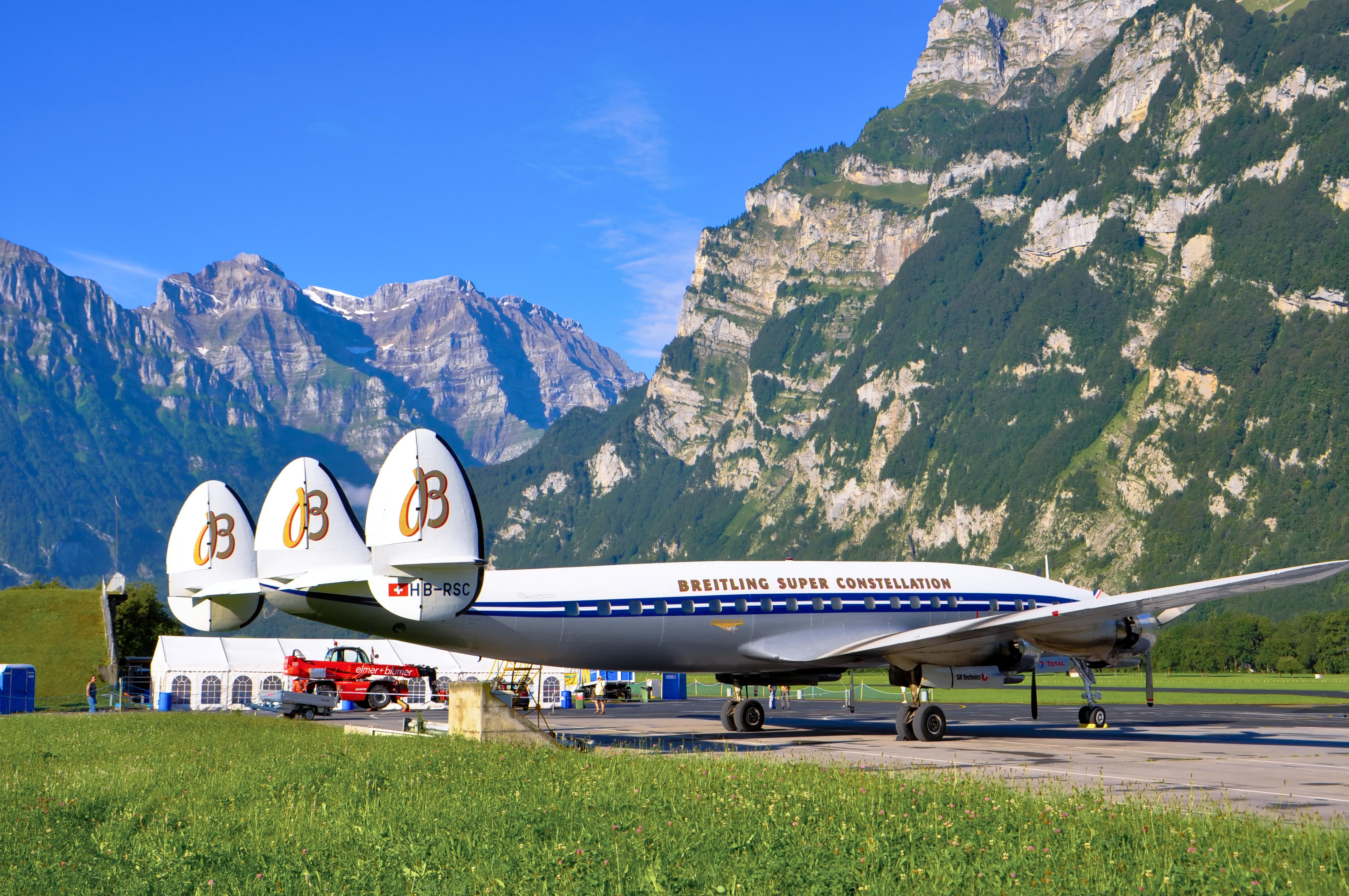 Breitling Super Constellation auf dem Militärflugplatz Mollis, Schweiz